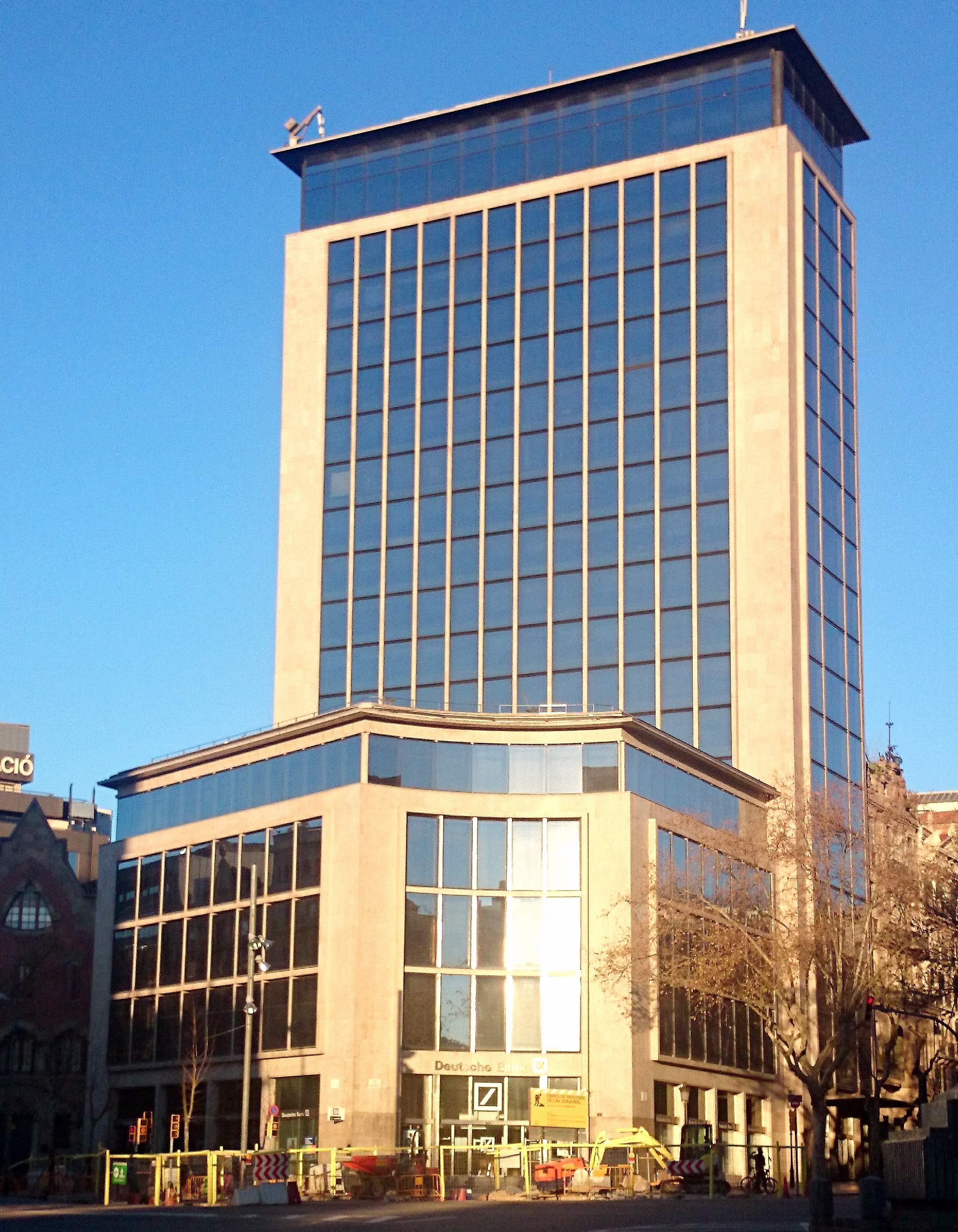 Edificio Europa (Barcelona)